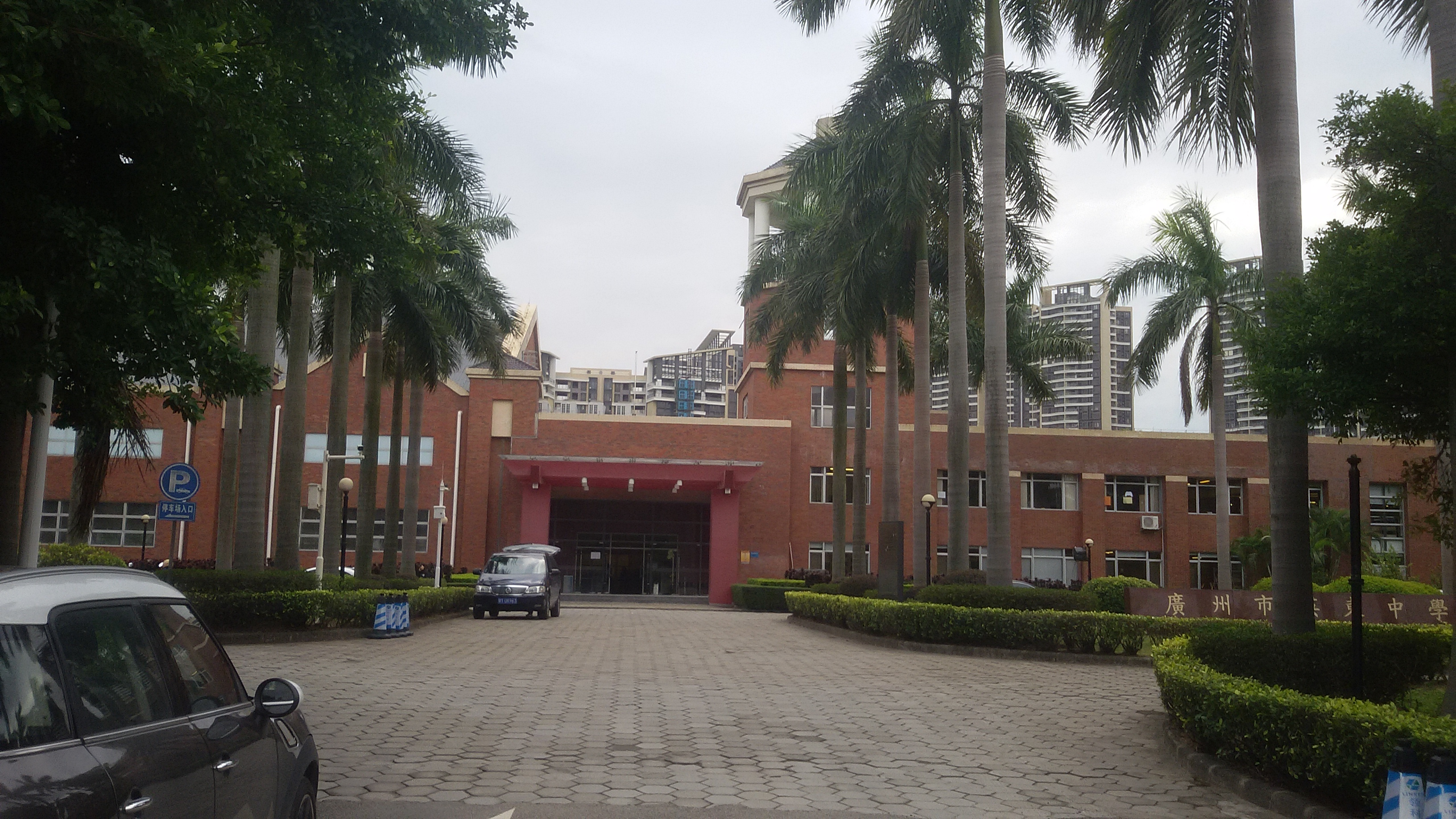 粵語: 廣州市英東中學